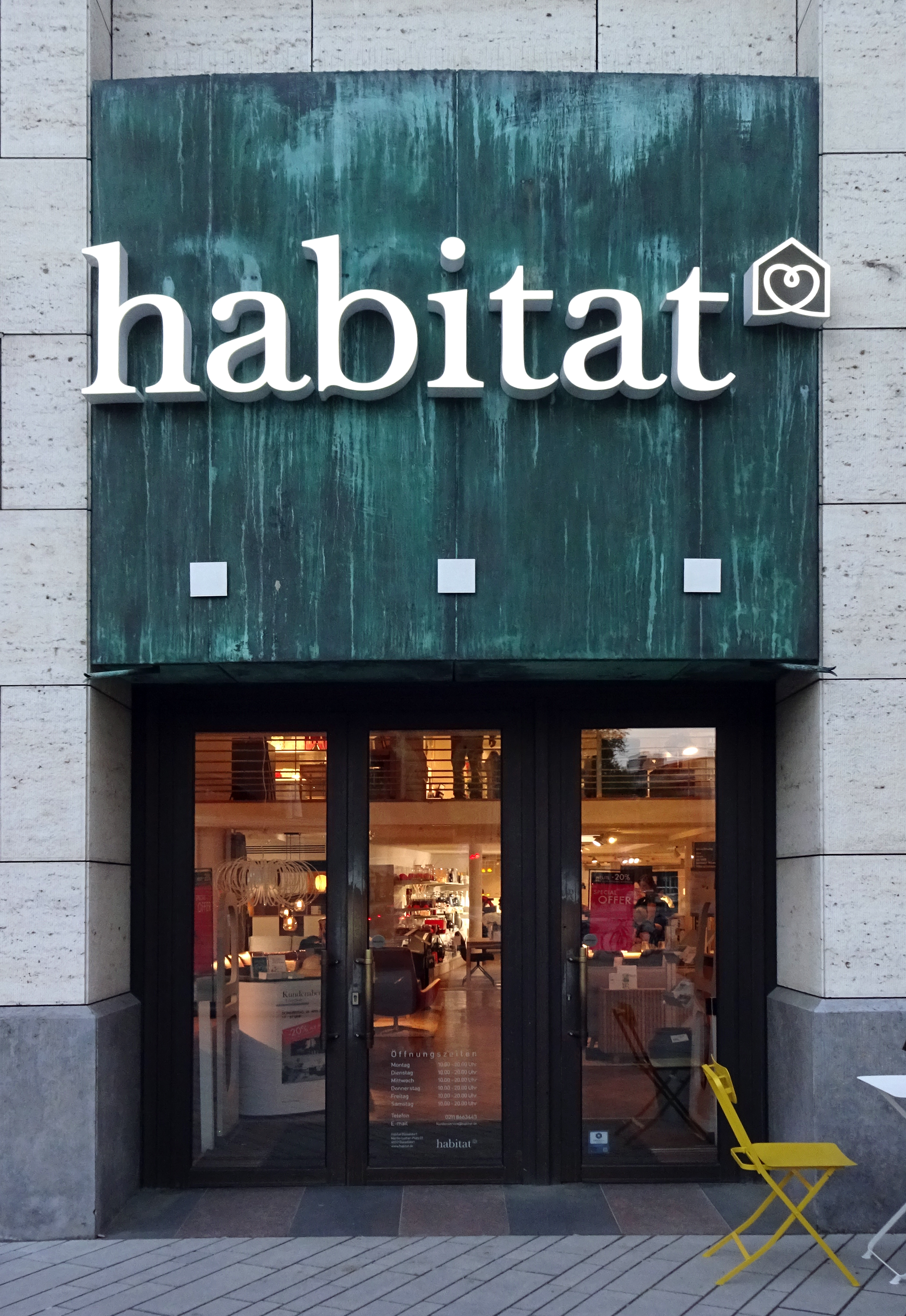 Habitat Eingang im Gebäude an den Schadow Arkaden, Martin-Luther-Platz 22 (vormals Berliner Allee 15), Düsseldorf-Stadtmitte